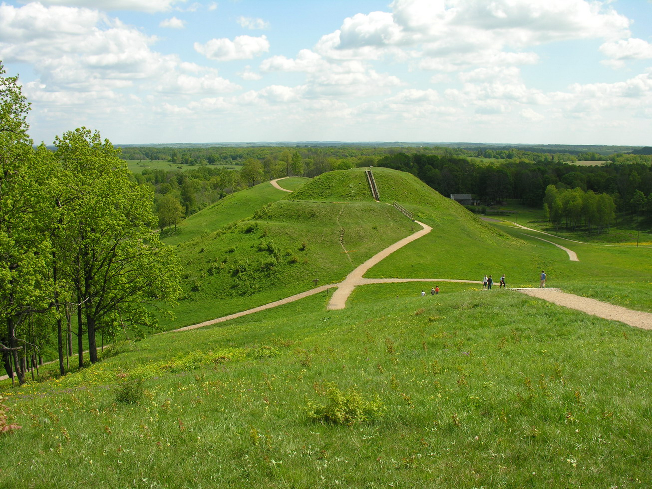 Medvėgalis